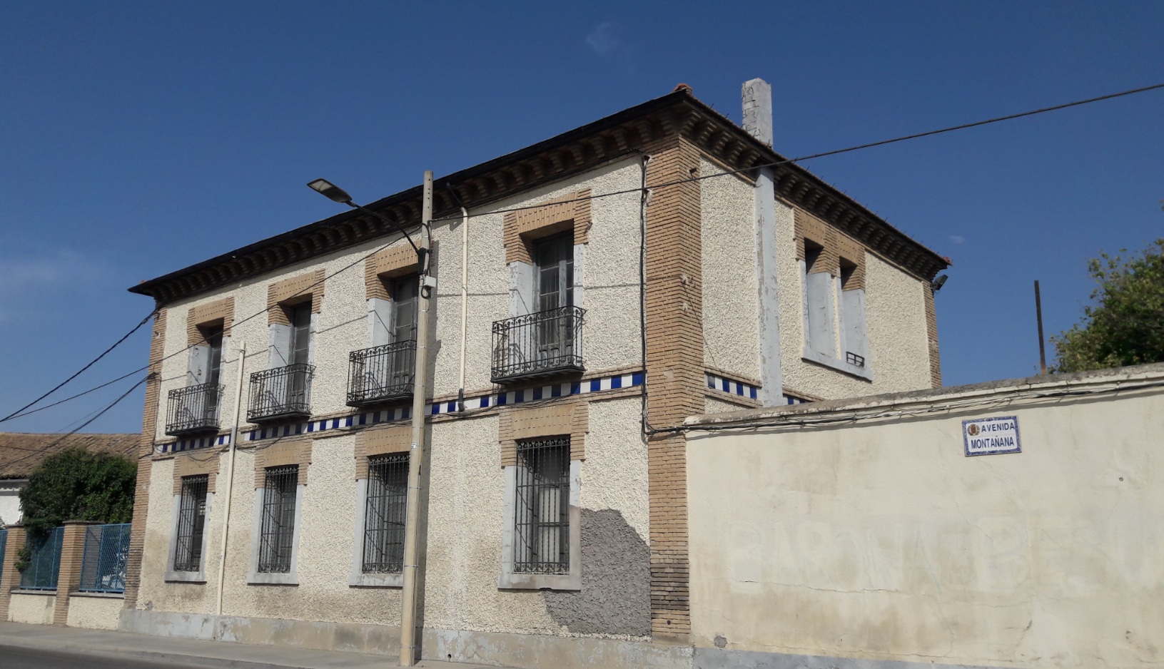 Casa del Director de la antigua fábrica papelera La Montañanesa - Archivo fotográfico del Gobierno de Aragón- Delia Sagaste